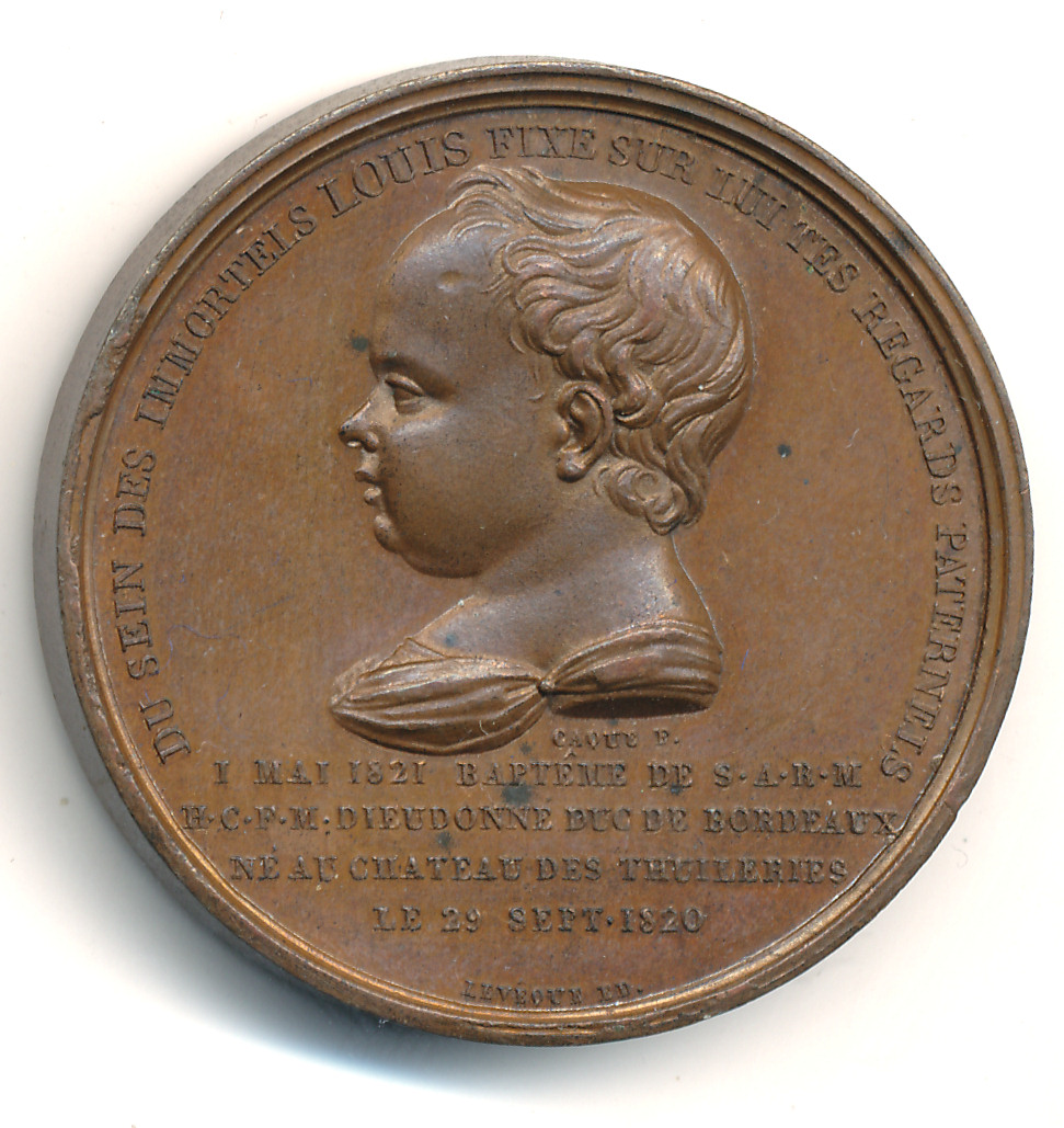 Médaille en bronze, 38mm, 33g, gravée par Caquée